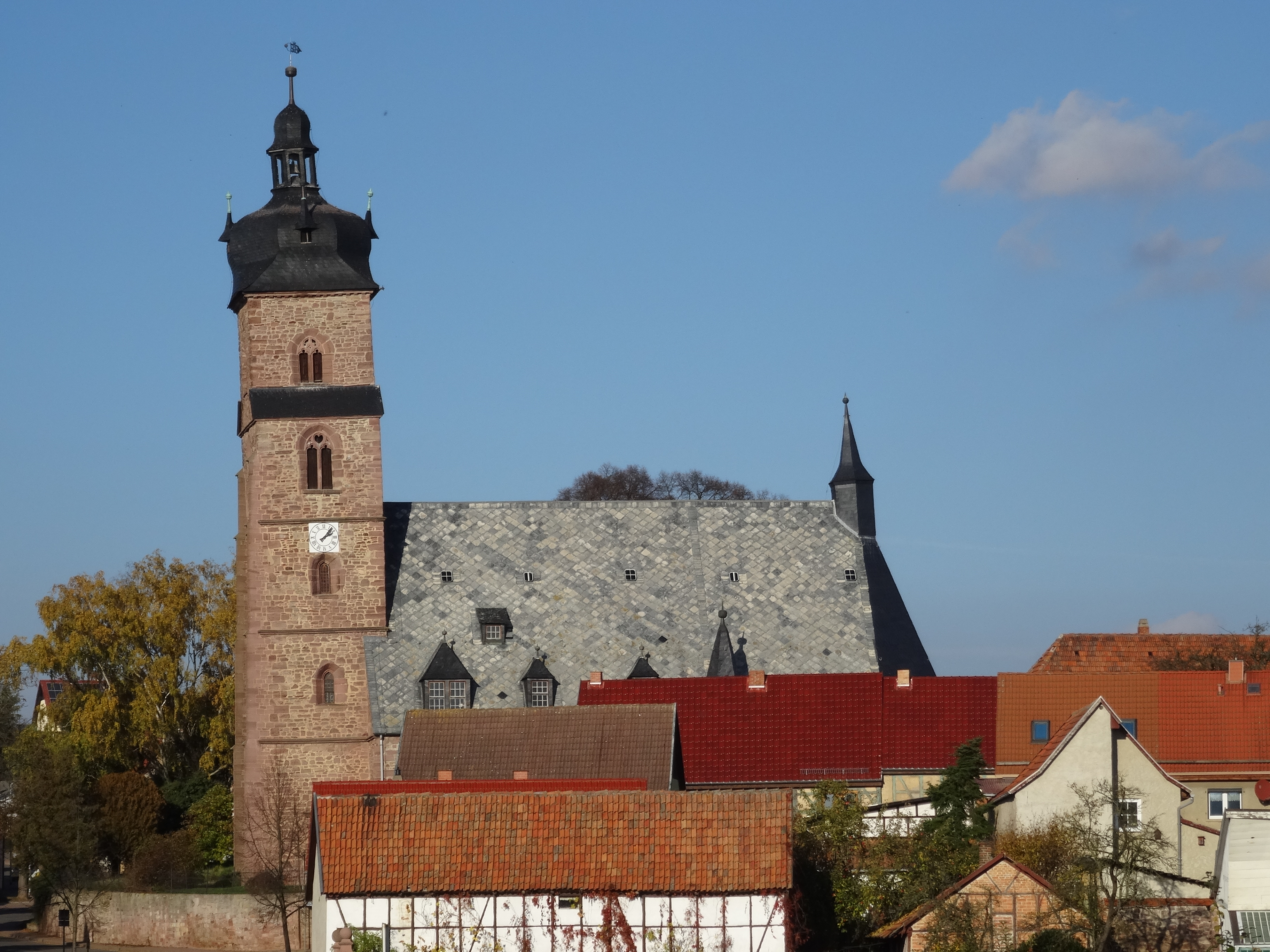 schiefer Turm St. Pankratius, Bendeleben